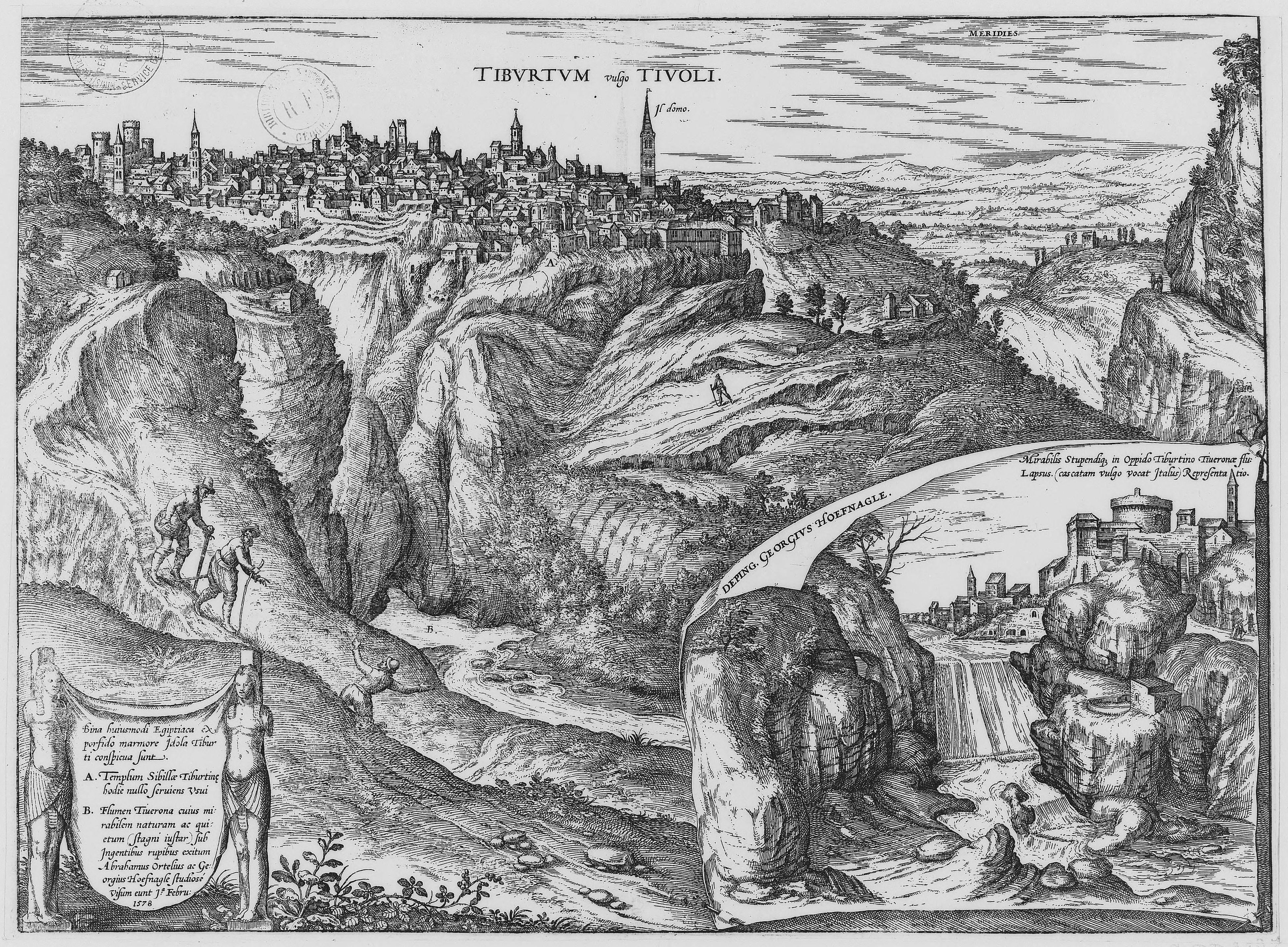 Tivoli en 1578, gravure de Abrahamus Ortelius et Georgius Hoefnagle. Peuvent être aperçu les principaux monuments de la ville dont la Rocca Pia (à l'extrême gauche) et les cathédrales San Lorenzo et Santa Maria Maggiore